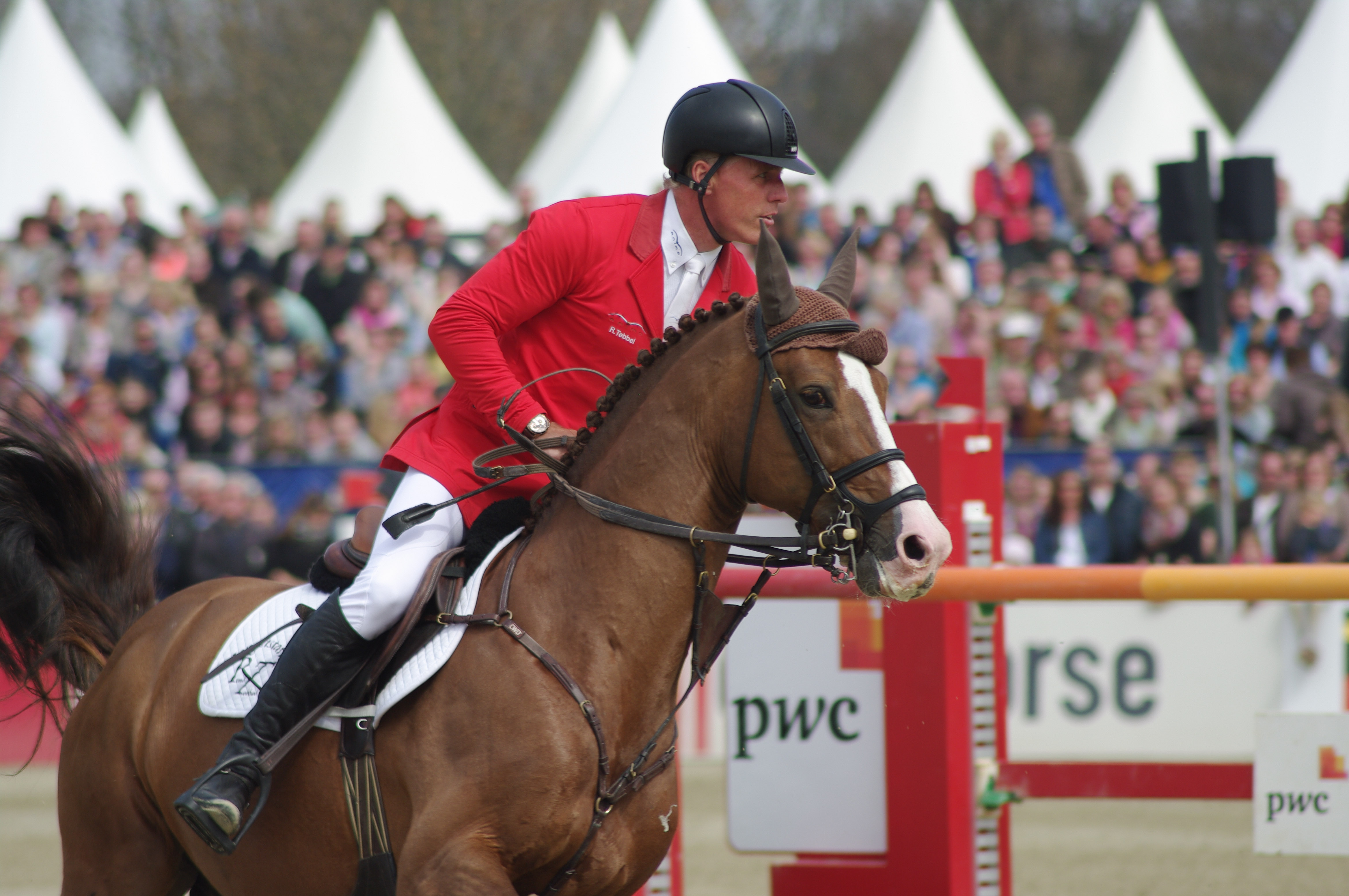 Horses & Dreams 2013: Rene Tebbel mit "Light On OLD"